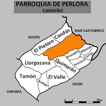 Situación de la parroquia de Perlora, nel conceyu de Carreño.